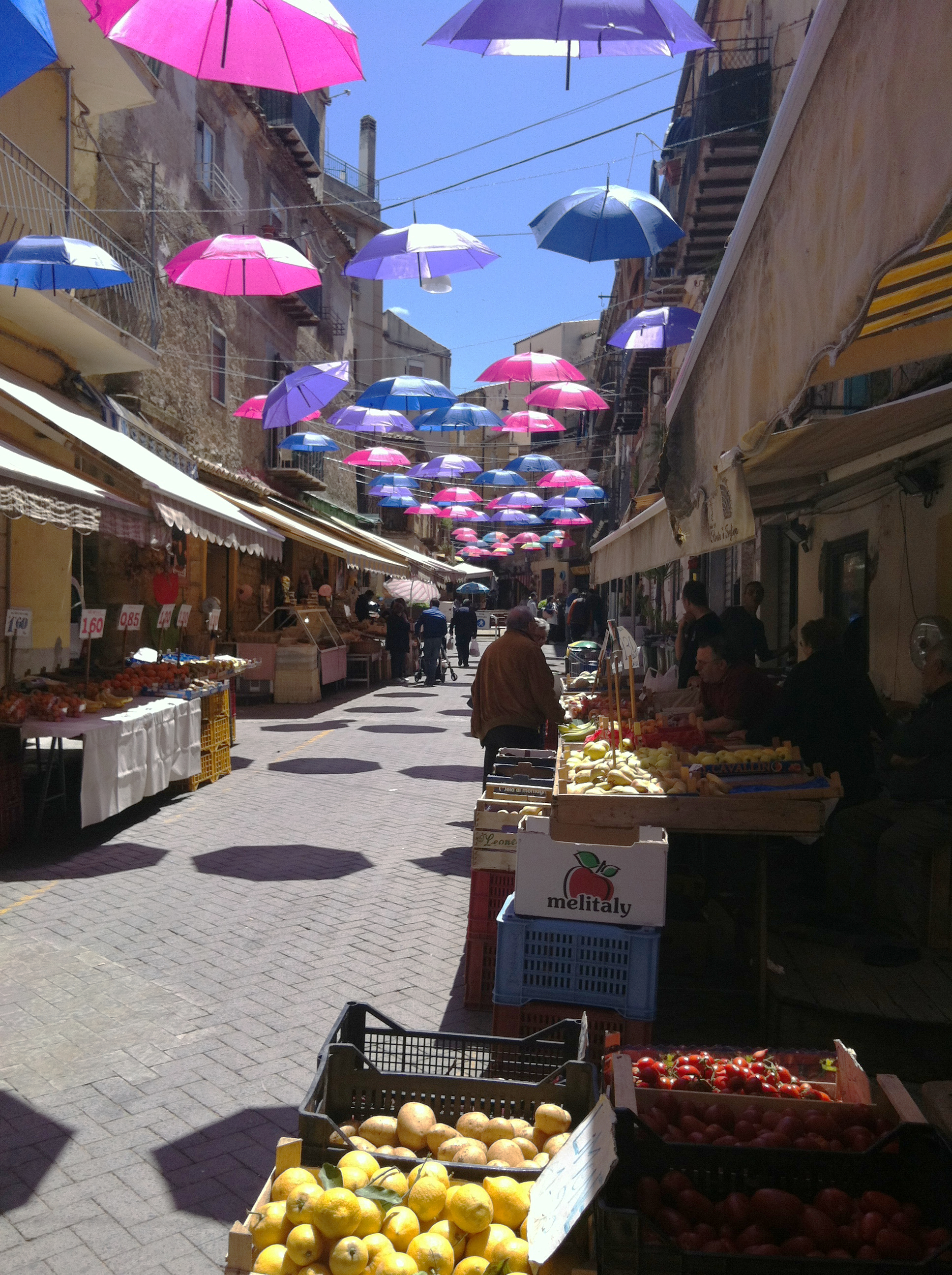 Strata a foglia bottega